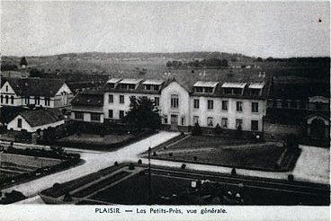 Plaisir (Yvelines-France) : Vue générale de l'asile